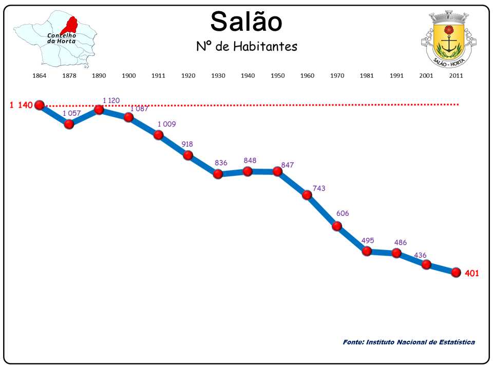 População